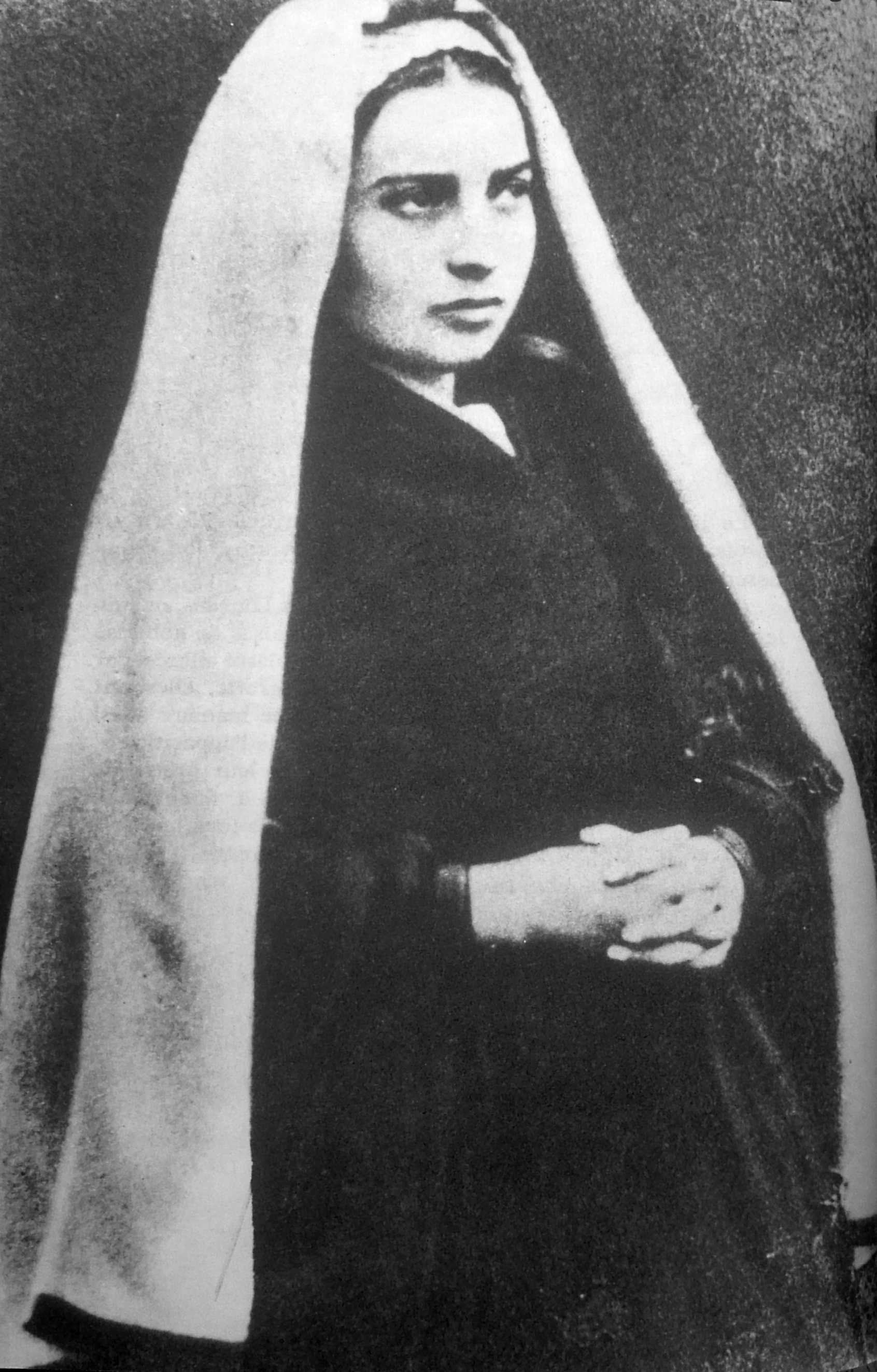 Bernadette Soubirous en 1863, photo de Billard-Perrin